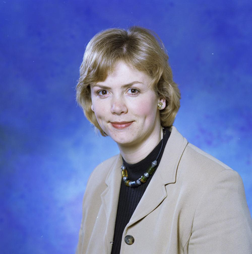 Marjan Moolenaar, 2Vandaag, 1998